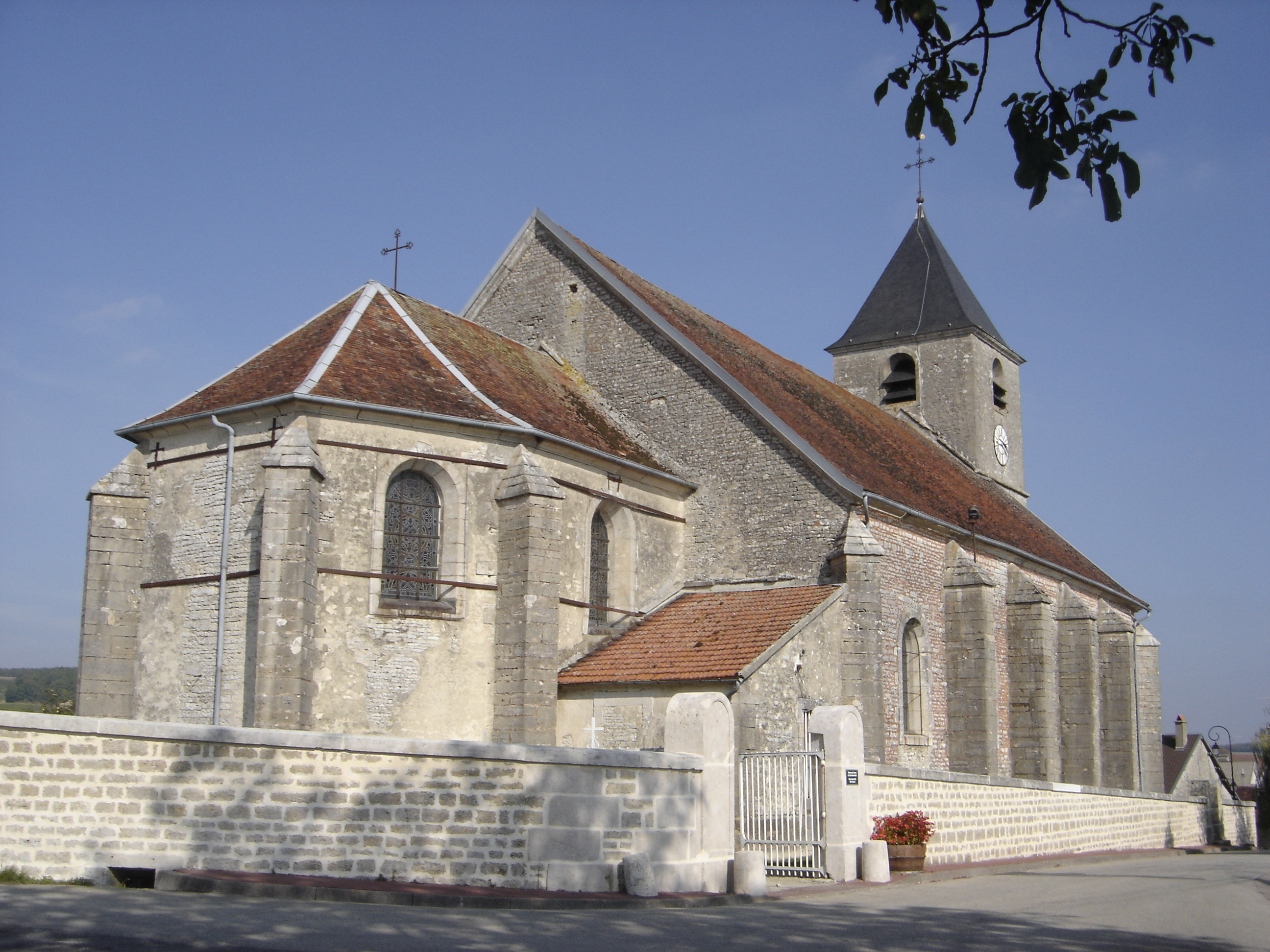 Eglise de Champignol-lez-Mondeville - Aube, France